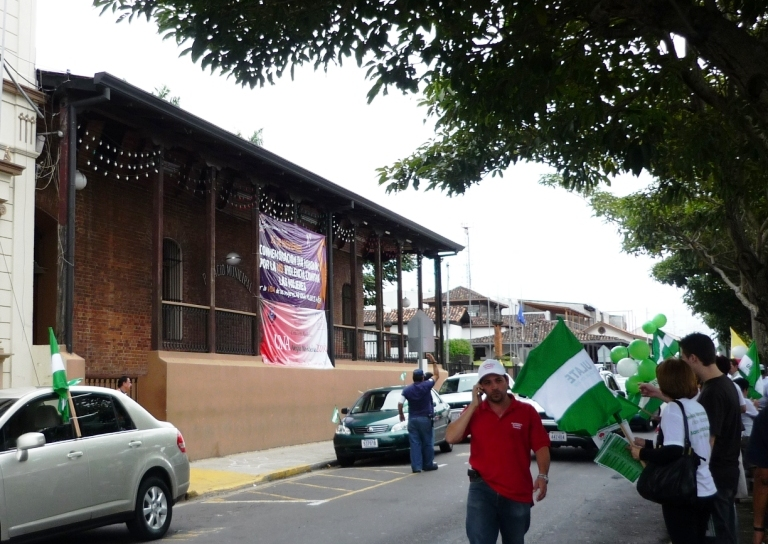 Edificio principal de la Municipalidad de Heredia, restaurado en el 2009